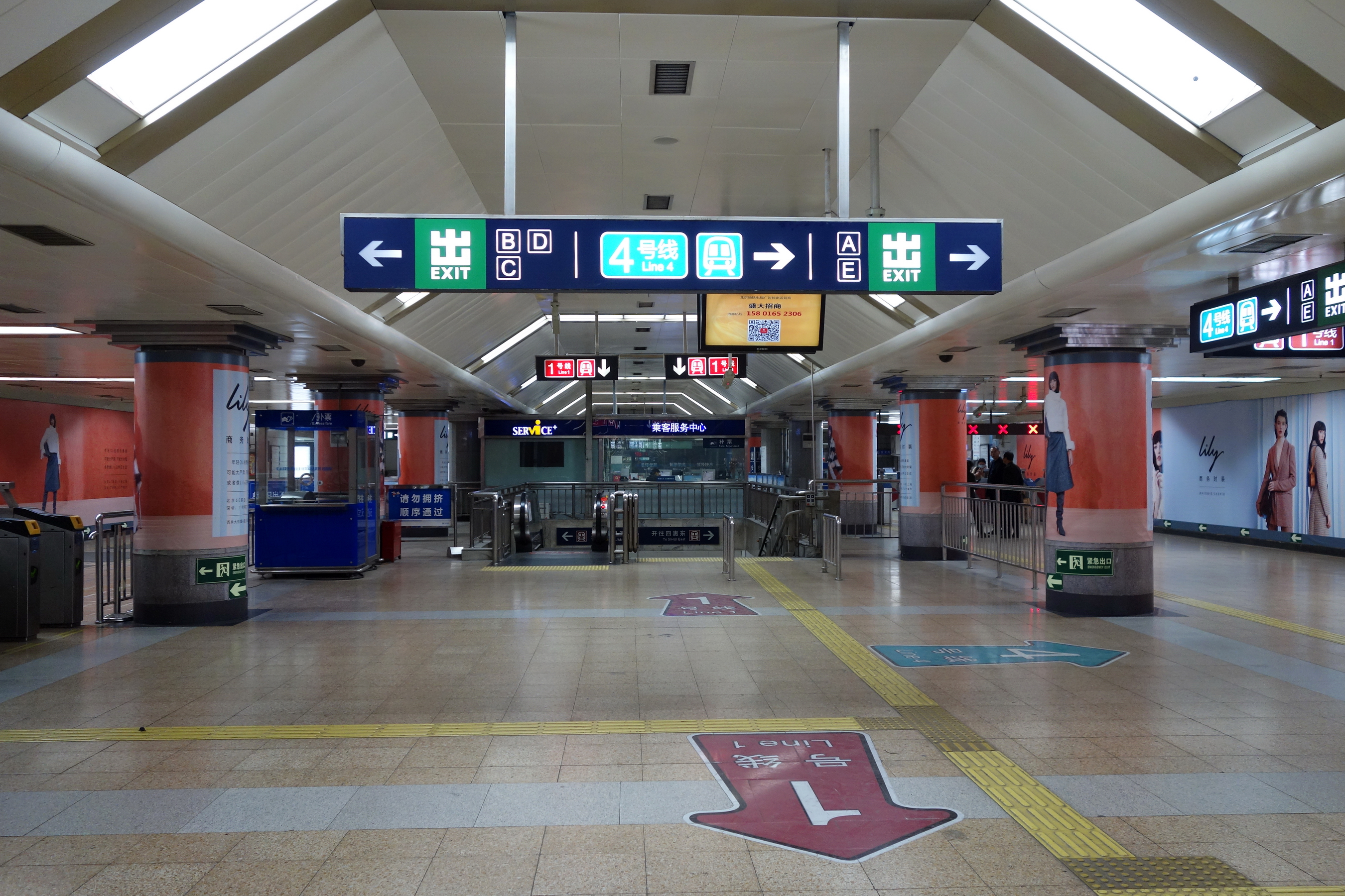 北京地铁1号线西单站站厅